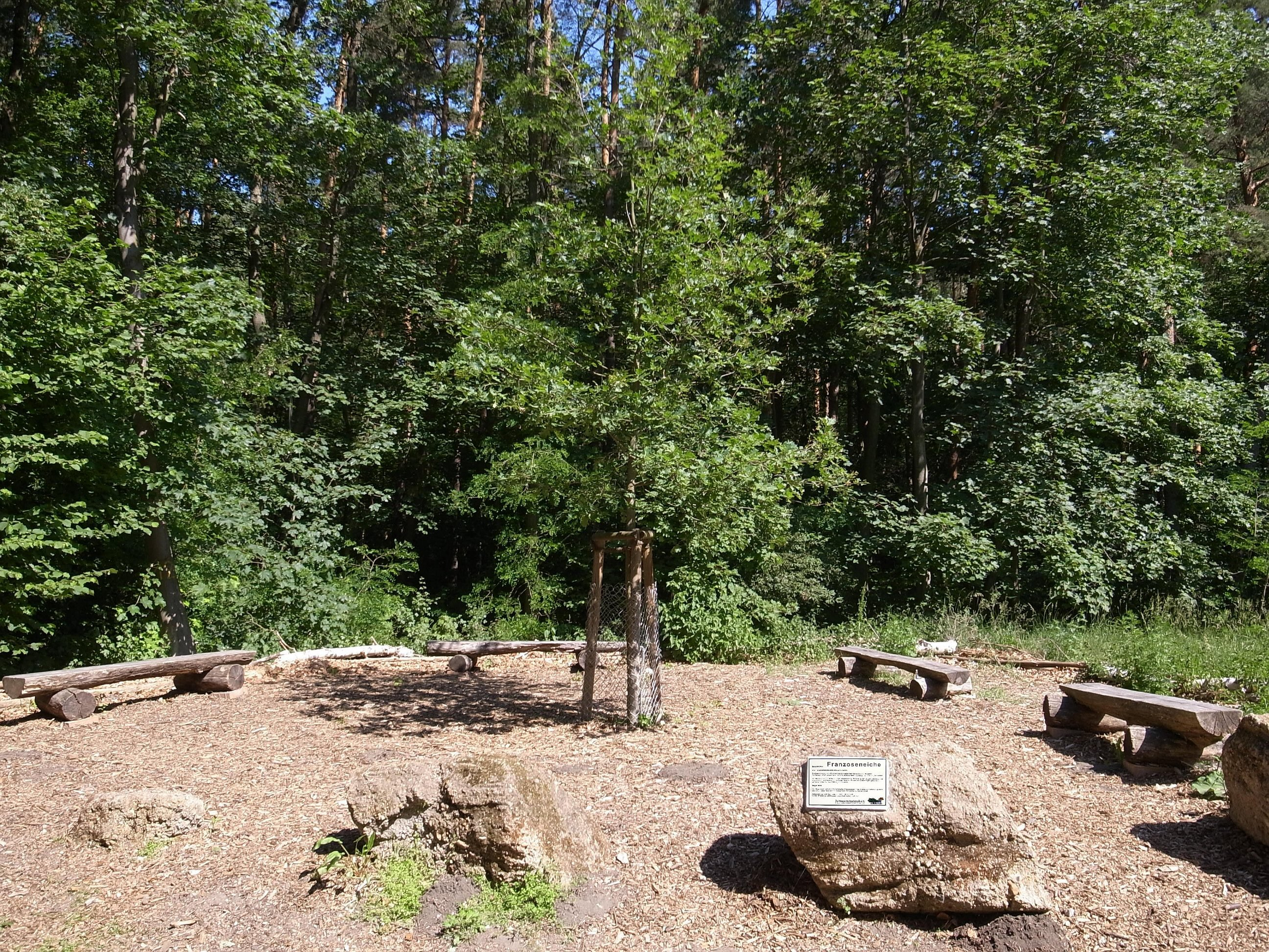 Dessau Kochstedt,Franzoseneiche, alte Landmarke in der Mosigkauer Heide